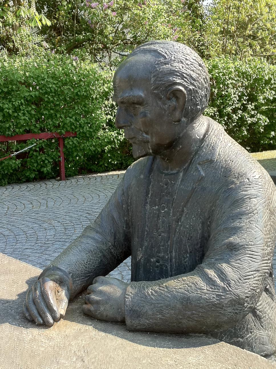 Bronzestatue des Heimatdichters Carl Schmachtenberg auf dem Marktplatz in Wülfrath-Düssel